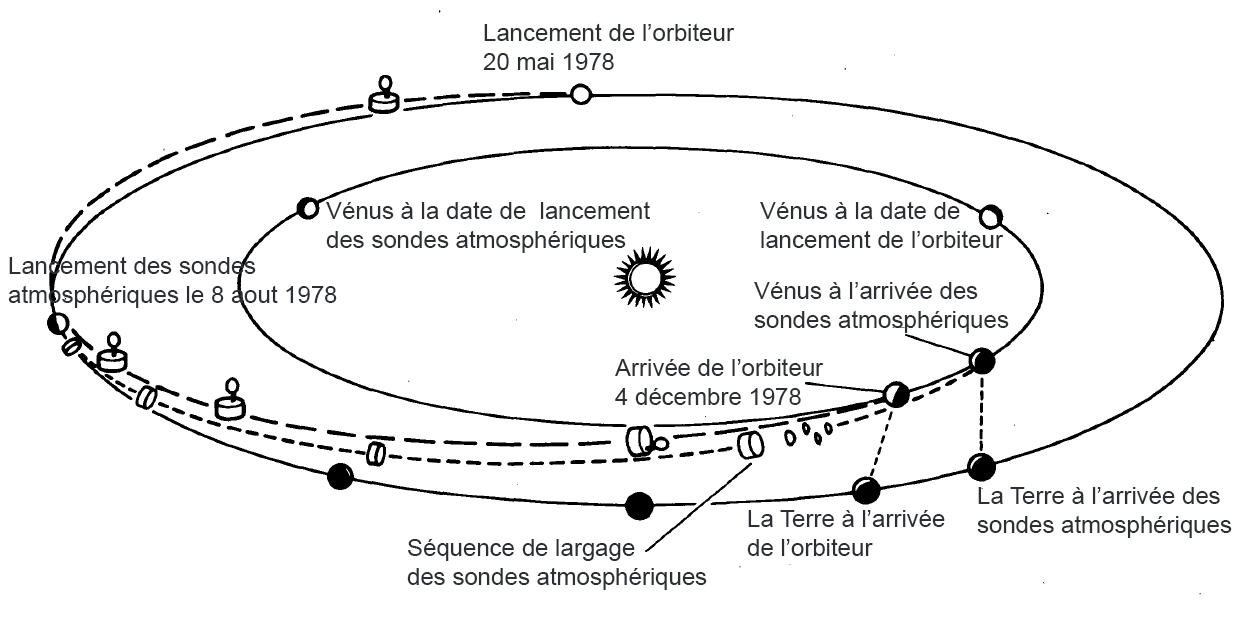 Trajectoire des deux sondes Pioneer Venus (légendes en francais)